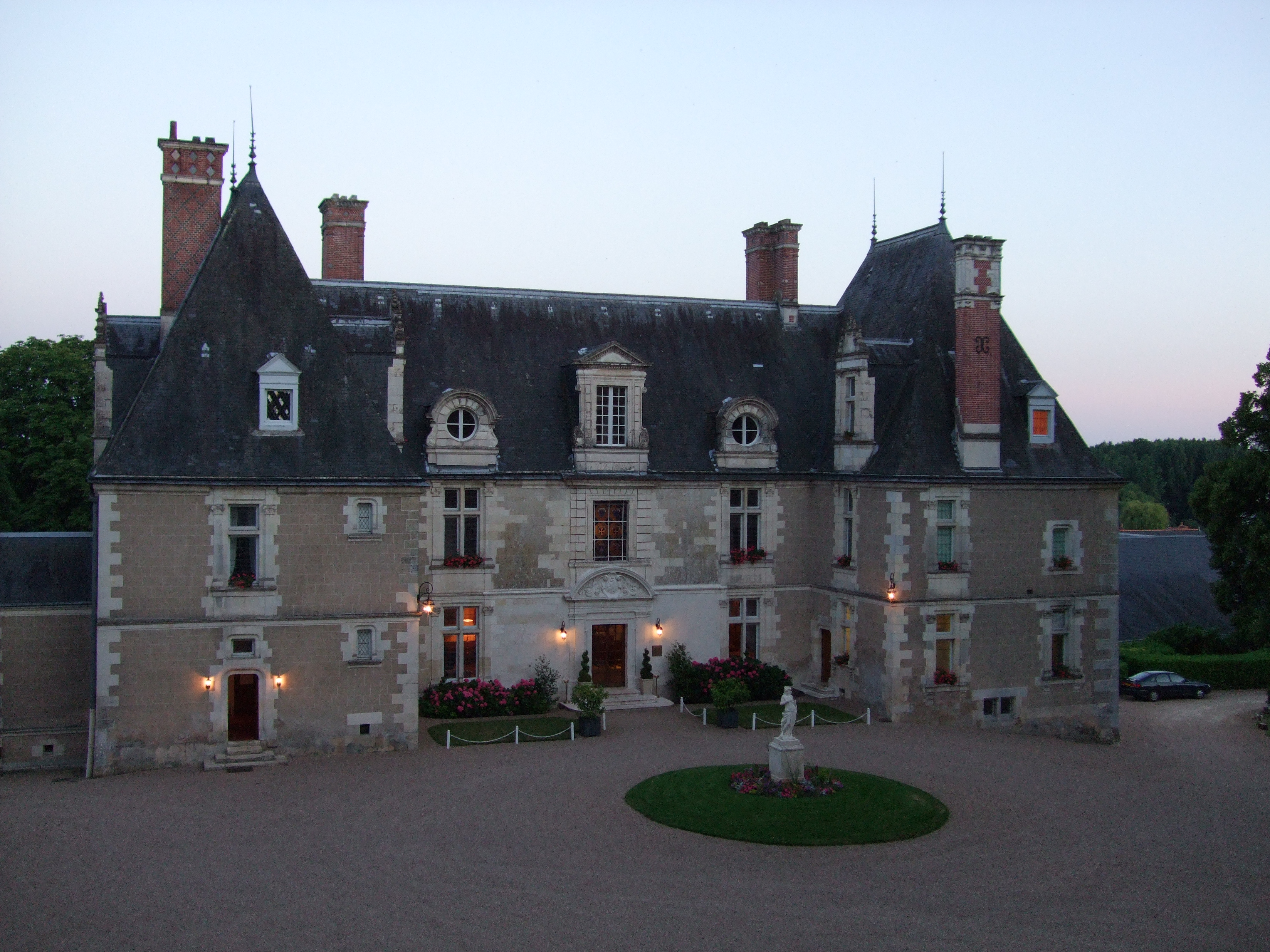 Photgraphie prise le soir au dessus de la grange